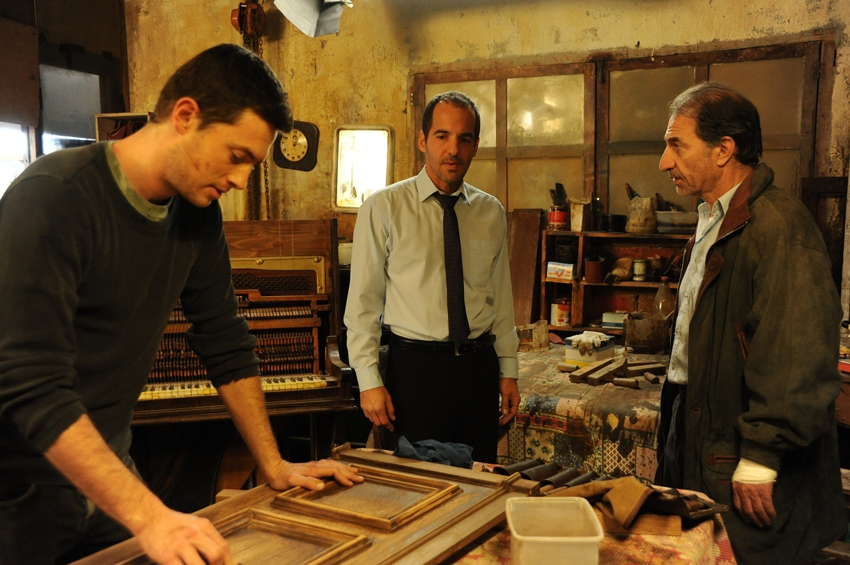 מתוך הסרט בוקר טוב אדון פידלמן